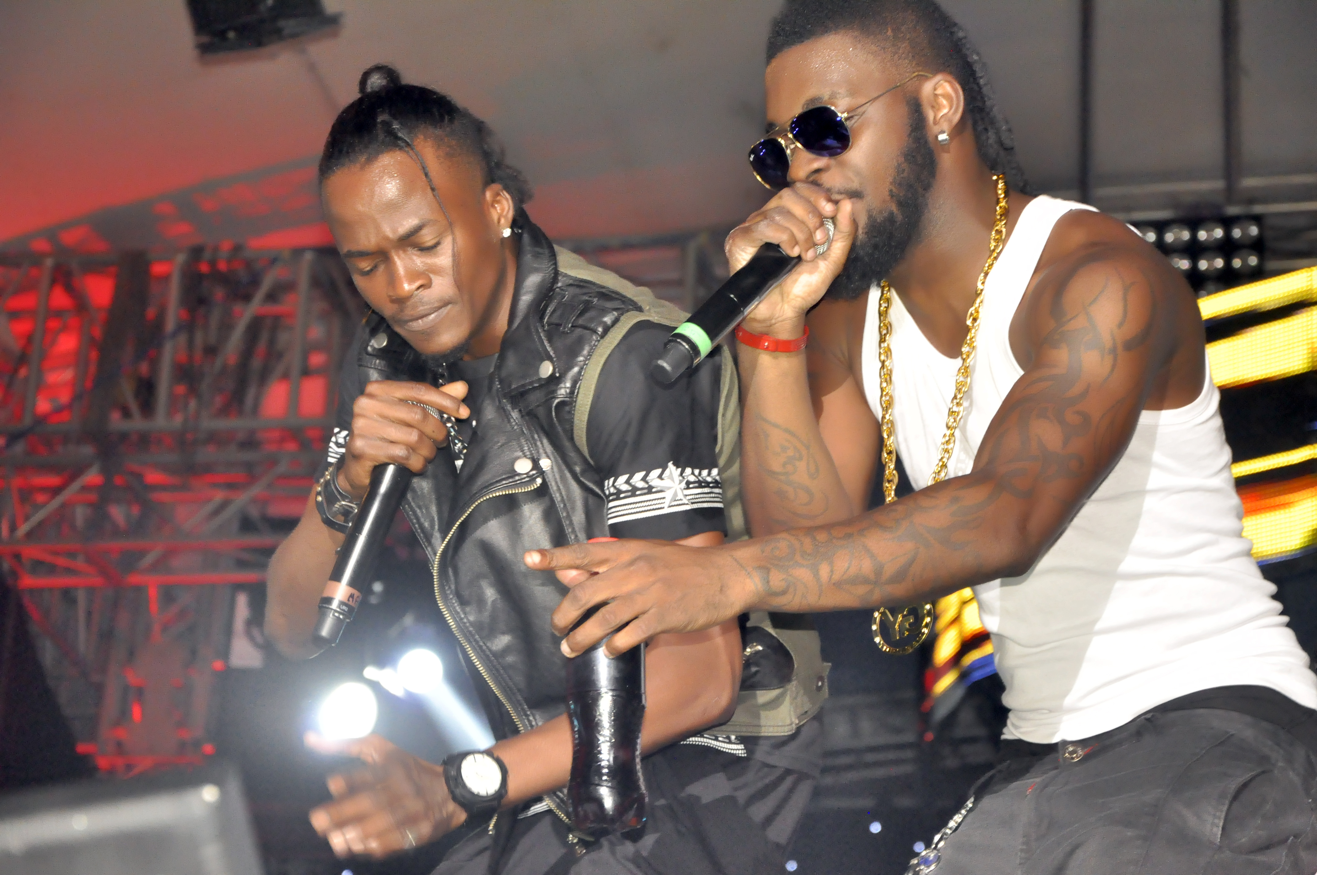 Arafat Dj et Debordo Likufa, des rivaux de longue date [1], sur un meme Scene à Abidjan This is an image from Ivory Coast